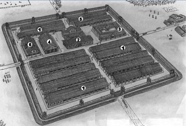 Rekonstruktionsversuch des Holz-Erde-Kastell von Künzing (1. Bauphase)1. Kasernen (contubernia), 2. Kommandogebäude (principia), 3. Haus des Lagerkommandanten (praetorium), 4. Lagerhaus (horreum), 5. Pferdeställe (stabulum), 6. Lagerlazarett (valetudiarum)